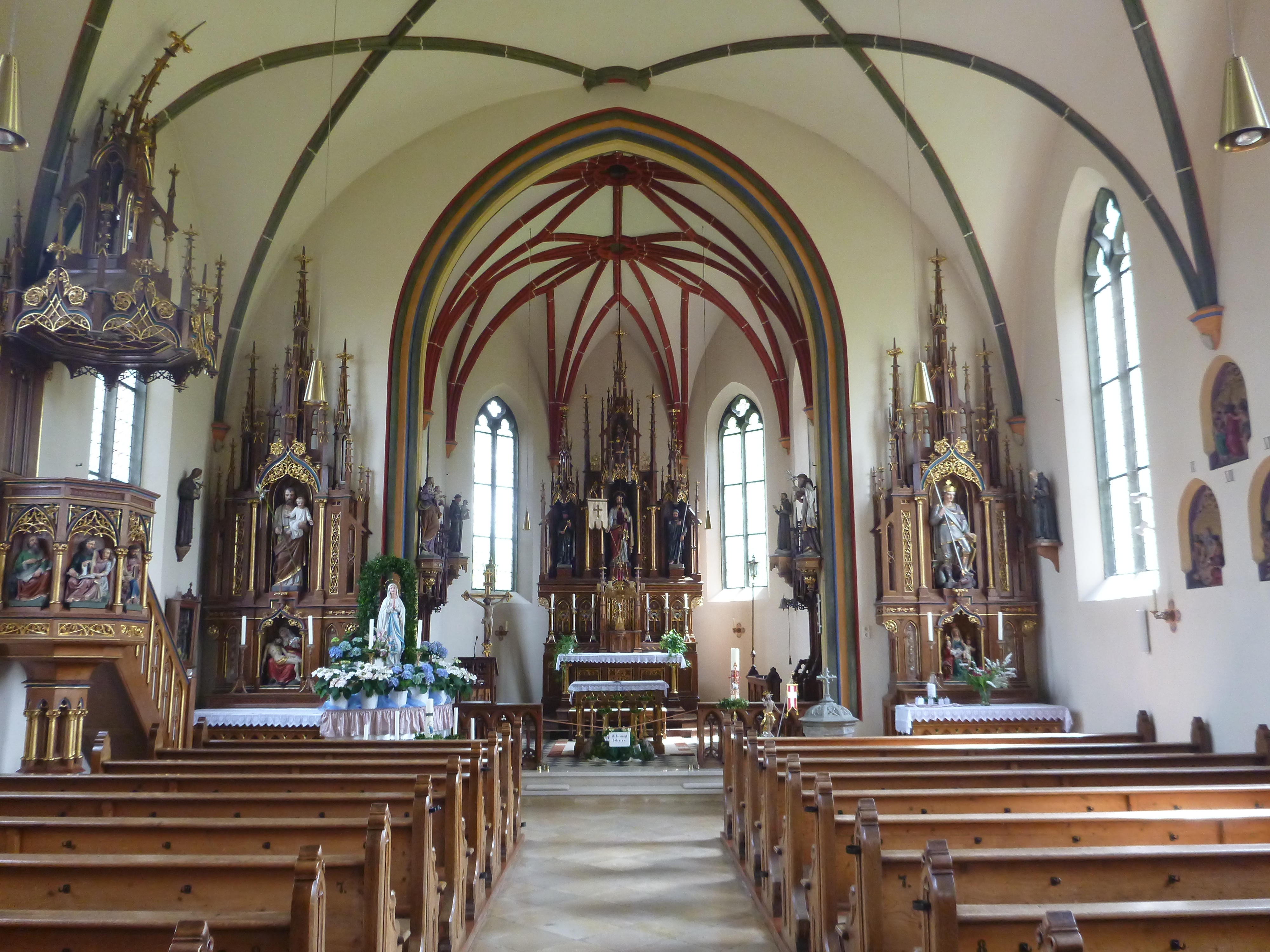 Katholische Pfarrkirche St. Georg, Innenraum